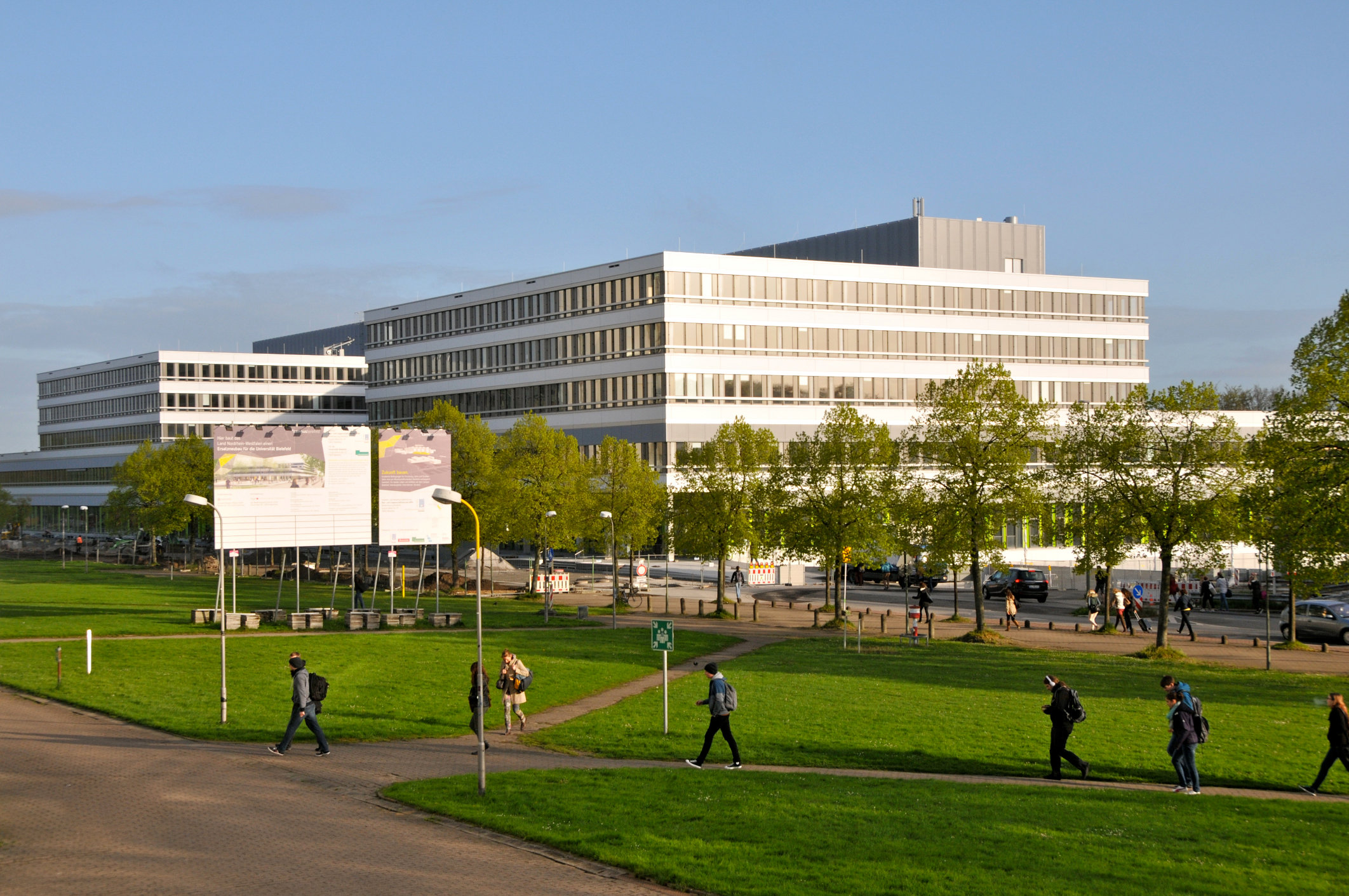 Gebäude X Außenansicht